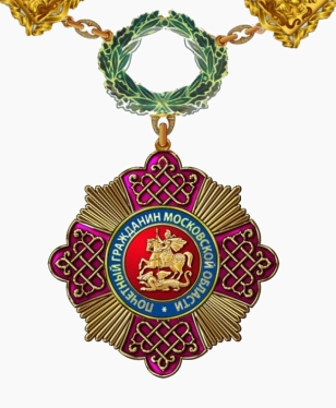 Знак «Почётный гражданин Московской области» с 2014 года